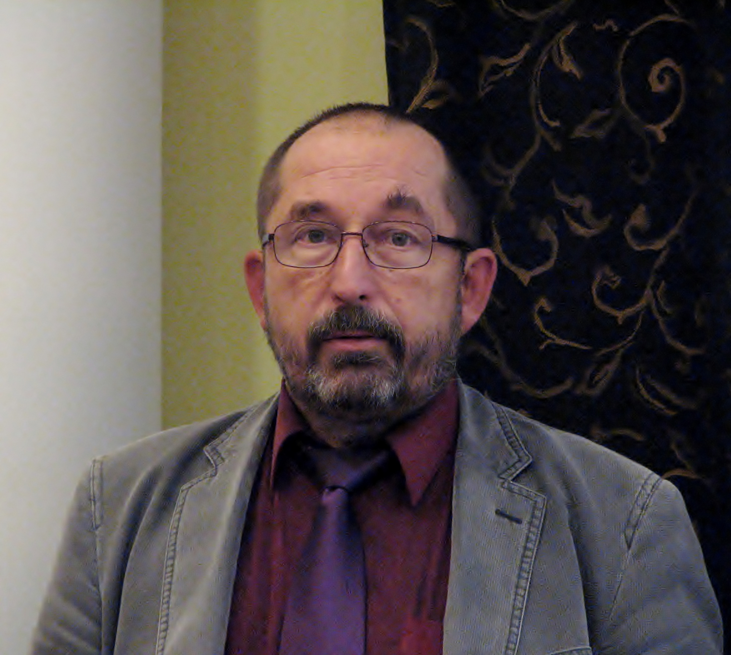 Eesti riigikohtunik Indrek Koolmeister koolitust andmas